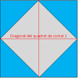 Quadrat per demostrar la irracionalitat de la arrel quadrada de 2